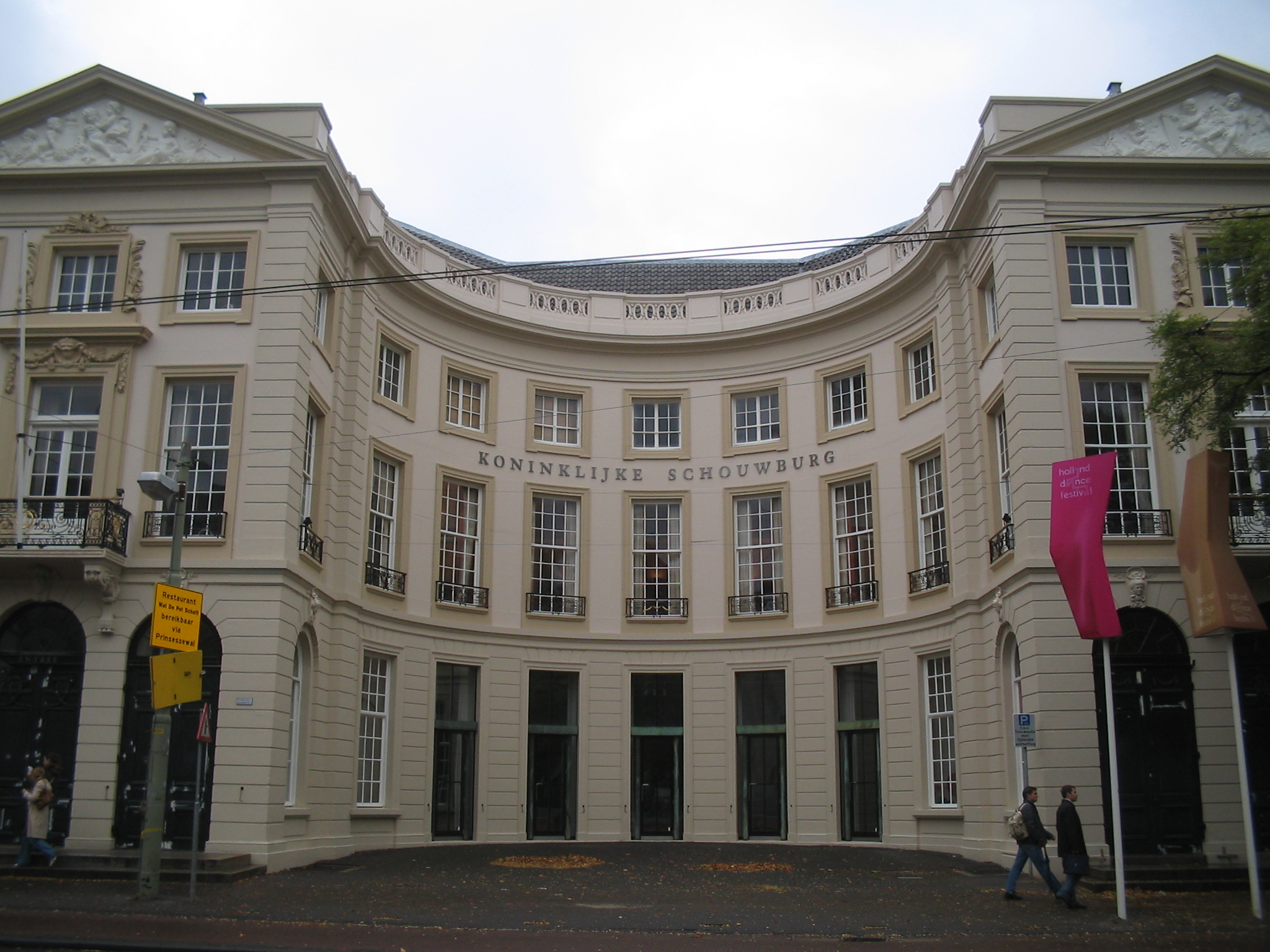 Koninklijke Schouwburg, Den Haag, 21 oktober 2005